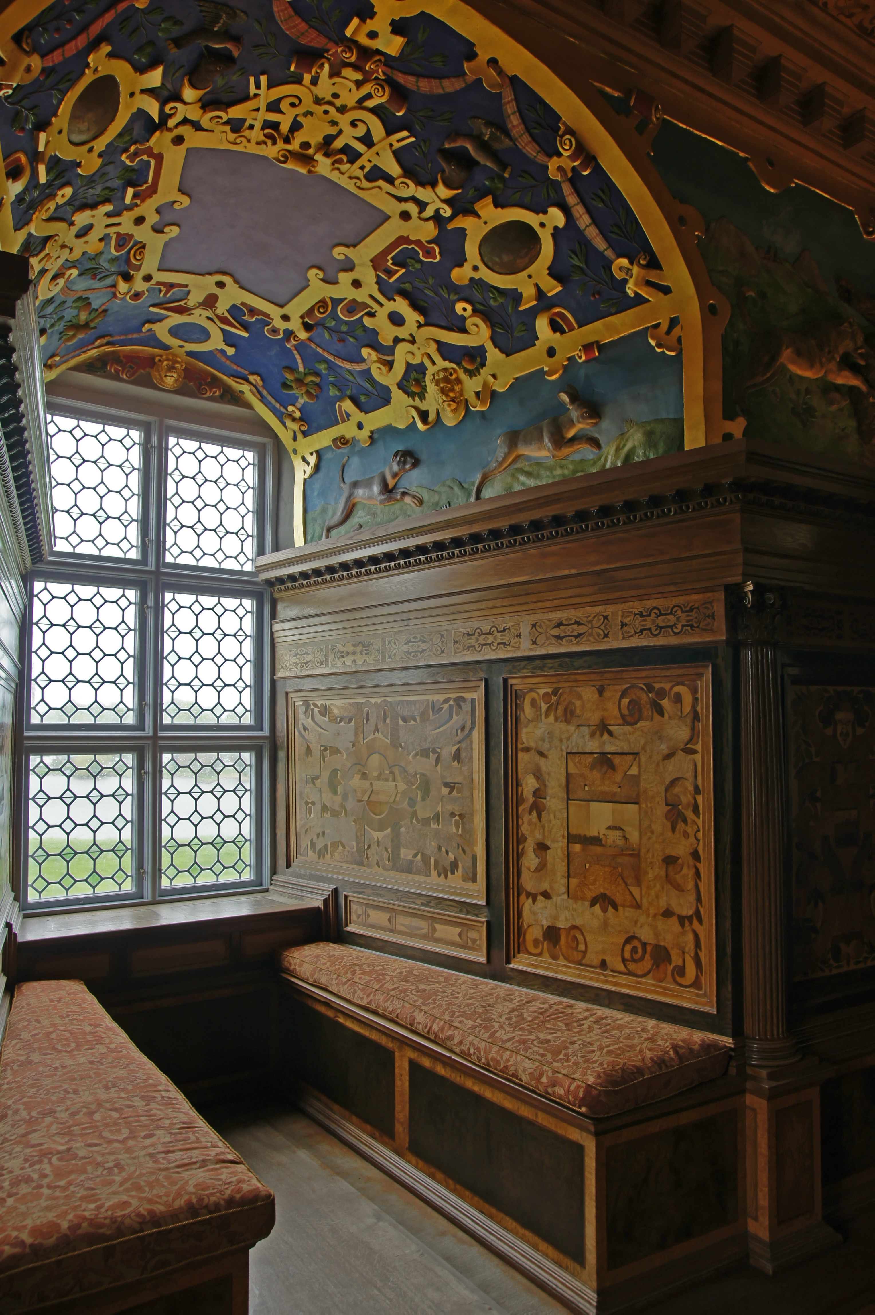 2010-05-22 06-05 Schweden 0712 Kalmar Slott